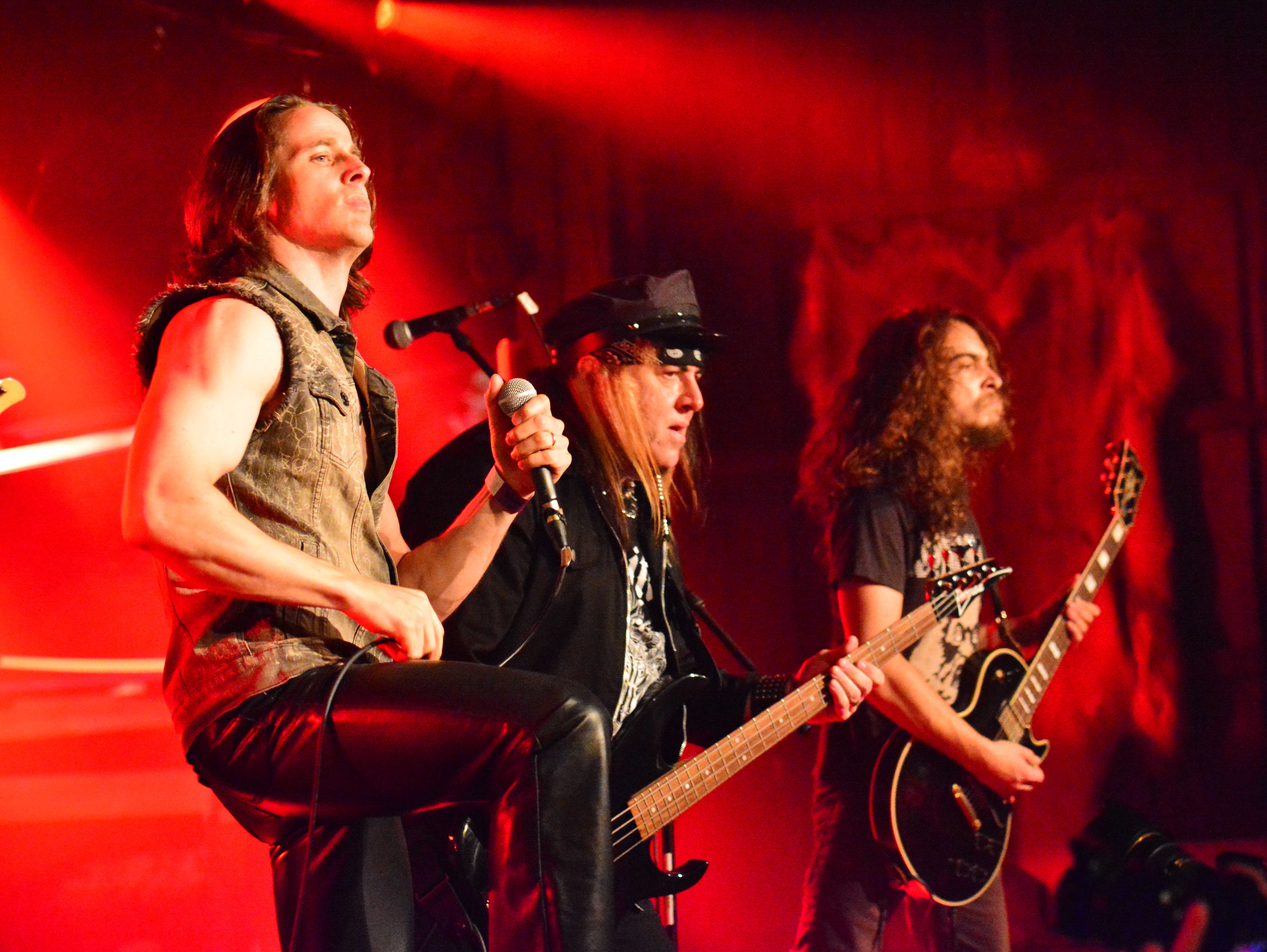 Riot V beim Headbangers Open Air 2014